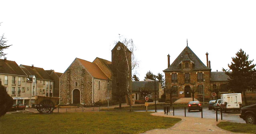 Place de la Mairie à Nozay (Essonne, France).